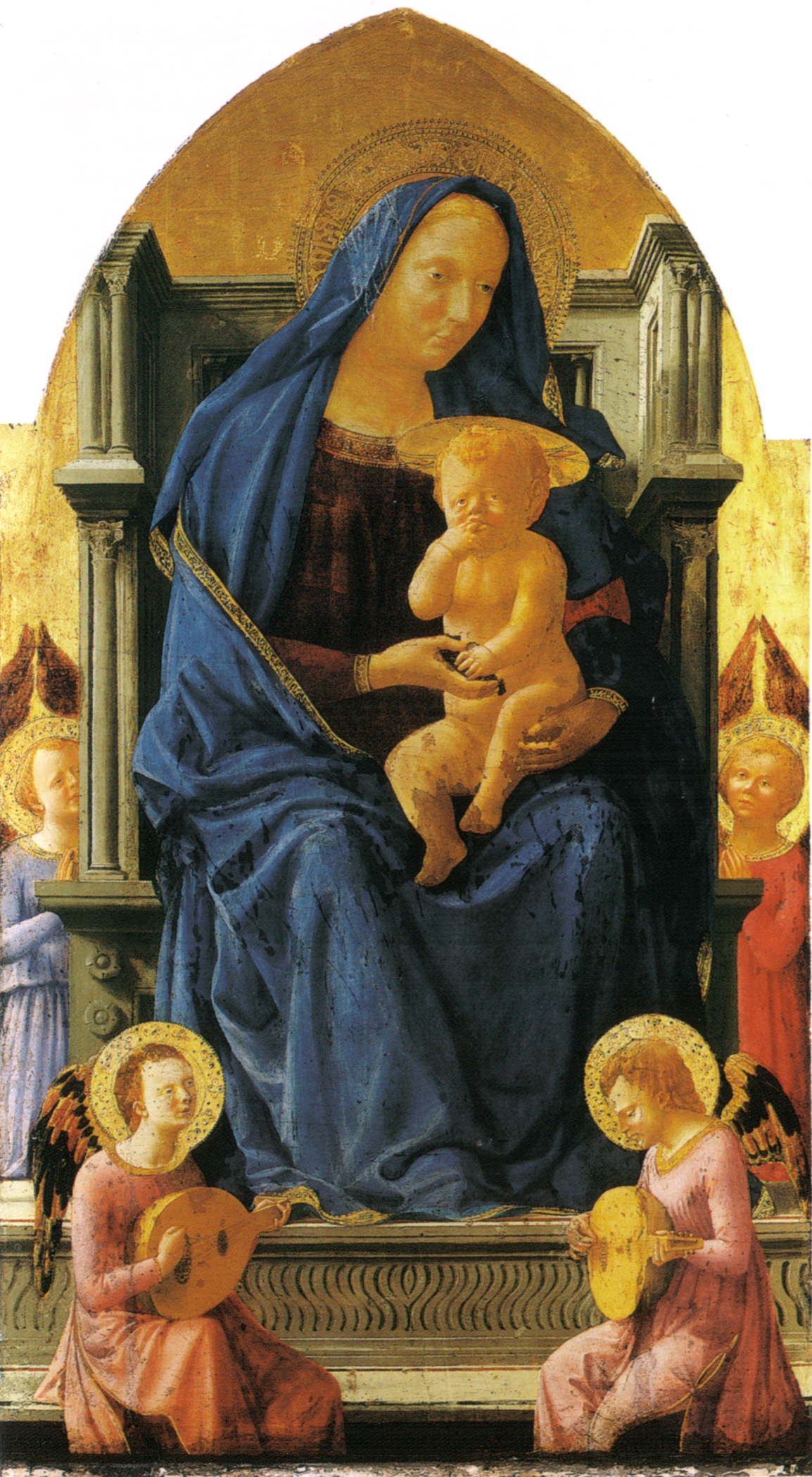 Madonna col BambinoMadonna and Childtitle QS:P1476,it:"Madonna col Bambino" label QS:Lit,"Madonna col Bambino" label QS:Len,"Madonna and Child"